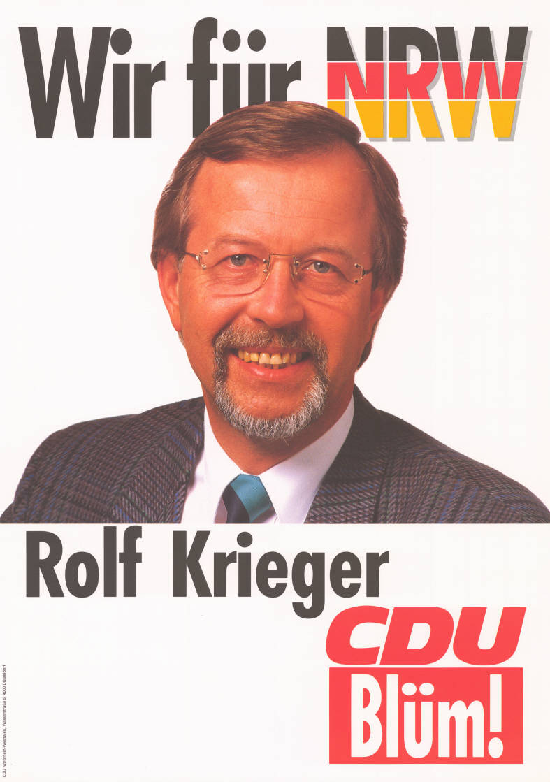 Wir für NRW Rolf Krieger CDU Blüm! Abbildung: Porträtfoto - Nationalfarben Plakatart: Kandidaten-/Personenplakat mit Porträt Auftraggeber: CDU Nordrhein-Westfalen, Düsseldorf Objekt-Signatur: 10-009 : 1119 Bestand: Landtagswahlplakate Nordrhein-Westfalen (10-009) GliederungBestand10-18: Landtagswahlplakate Nordrhein-Westfalen (10-009) » CDU Lizenz: KAS/ACDP 10-009 : 1119 CC-BY-SA 3.0 DE